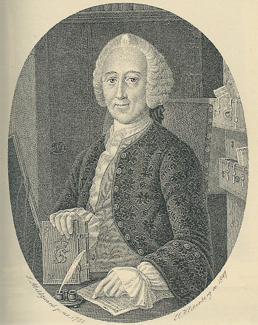 Jakob Langebek. Stik fra 1847 af E. C. W. Eckersberg efter miniaturemaleri af S. Abildgaard.